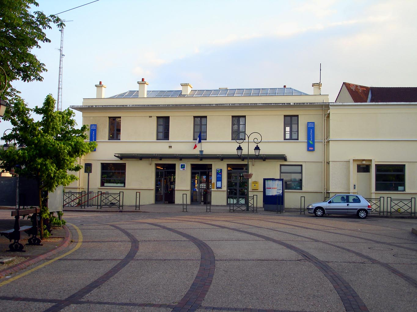 Gare de Montigny - Beauchamp à Montigny-lès-Cormeilles et Beauchamp (Val-d'Oise). Photo personnelle (own work) de Clicsouris.